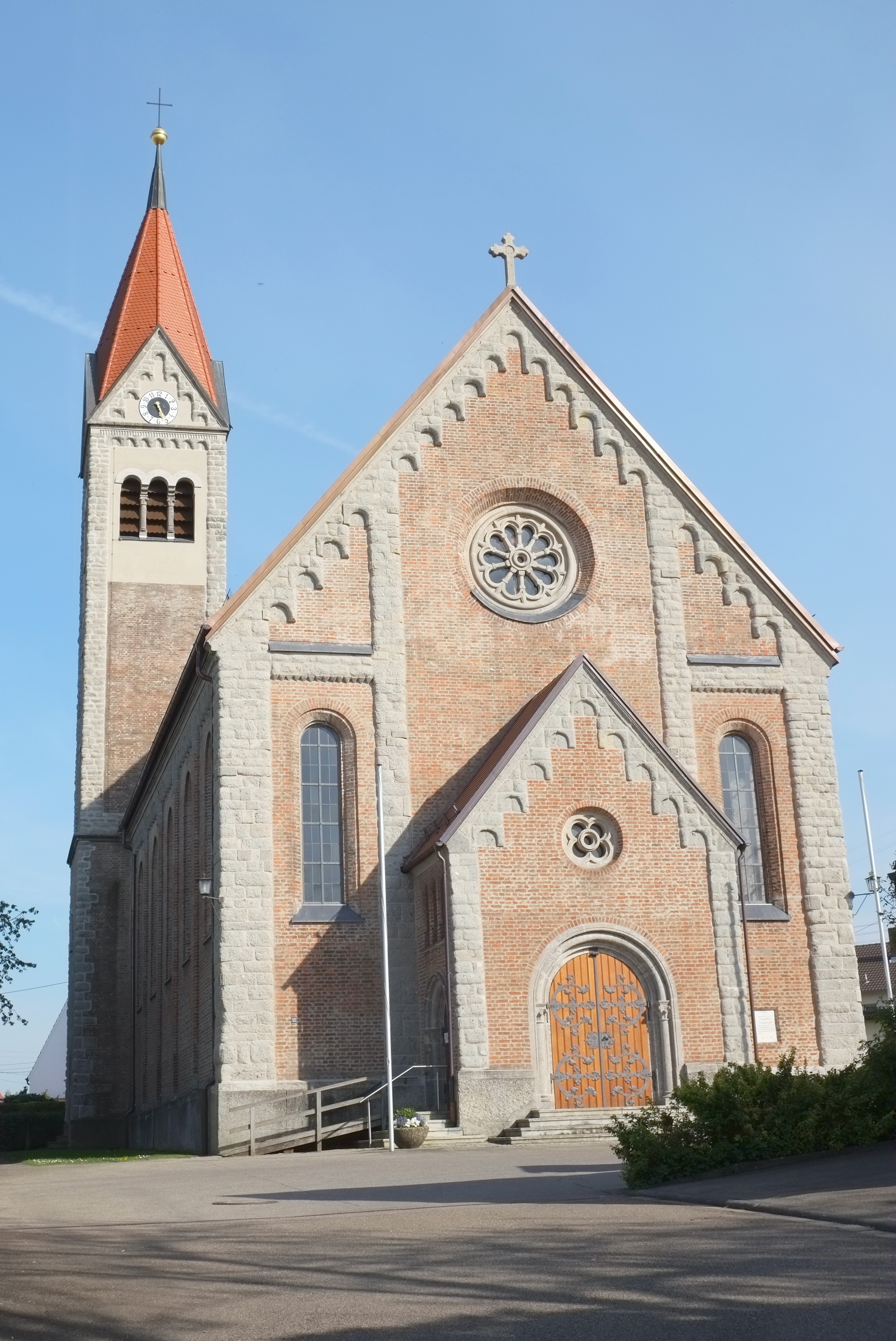 Kirche Maria Rosenkranzkönigin in Schretzheim, einem Stadtteil von Dillingen an der Donau (Bayern, Deutschland)